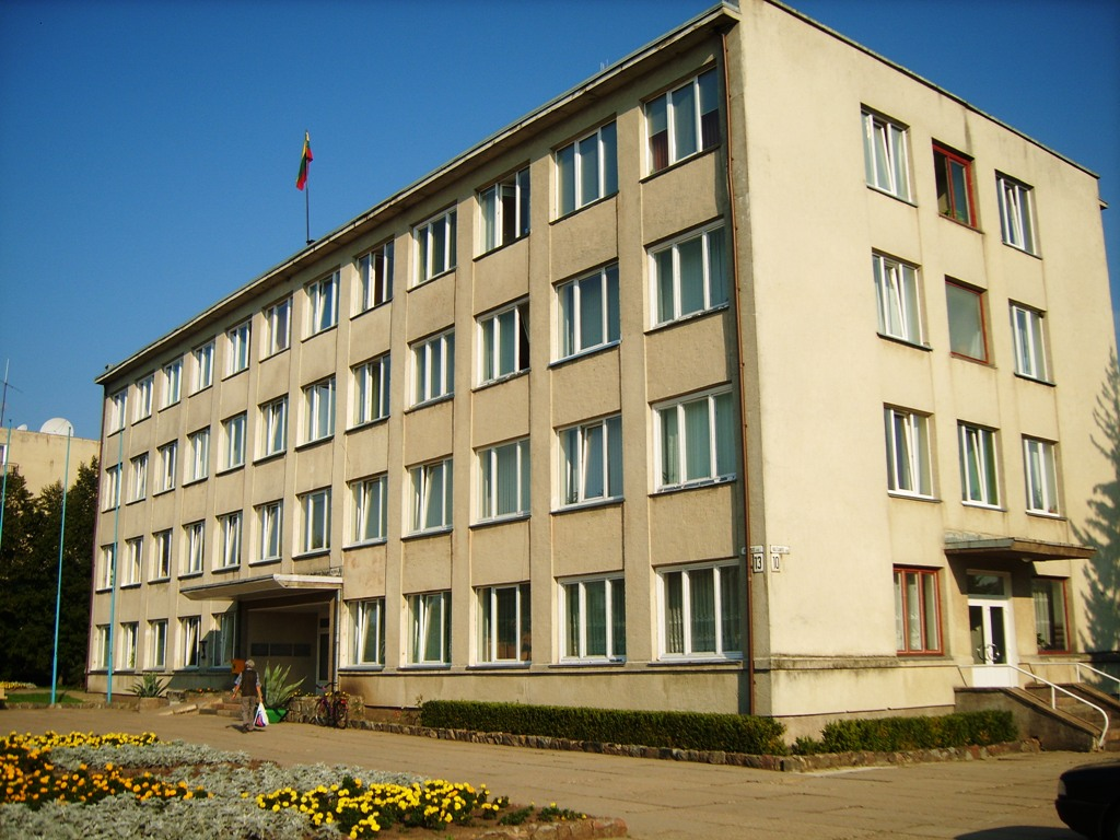 Skuodo rajono savivaldybės administracija (Skuodas district municipality Administration)